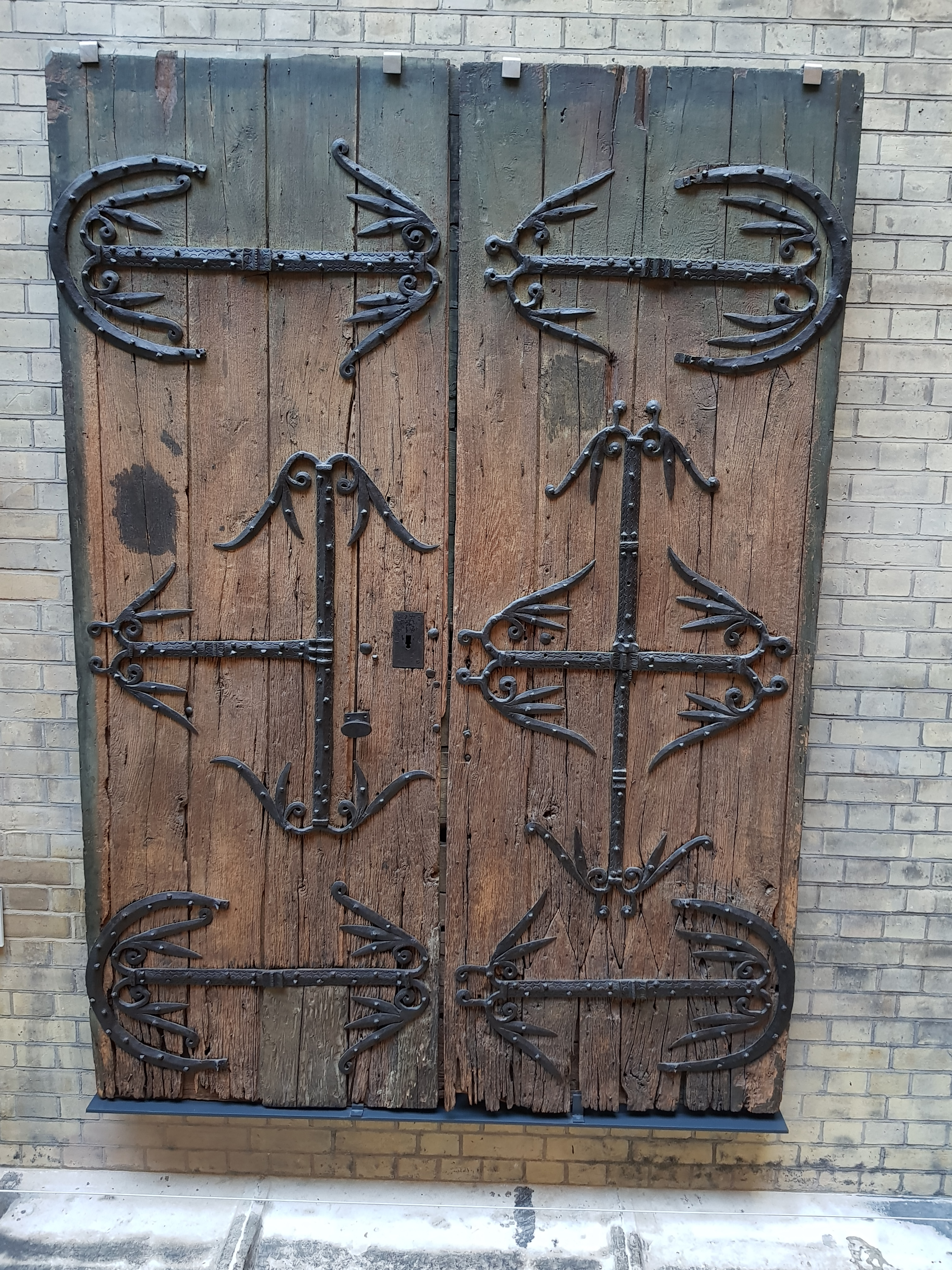 Porte de chêne provenant de Gannat, datée de 1200-1300, exposée au Victoria and Albert Museum, Londres, référencée sous le n° M.396.1924.